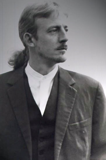 Michael Raeder Photoshooting für Joshua Project